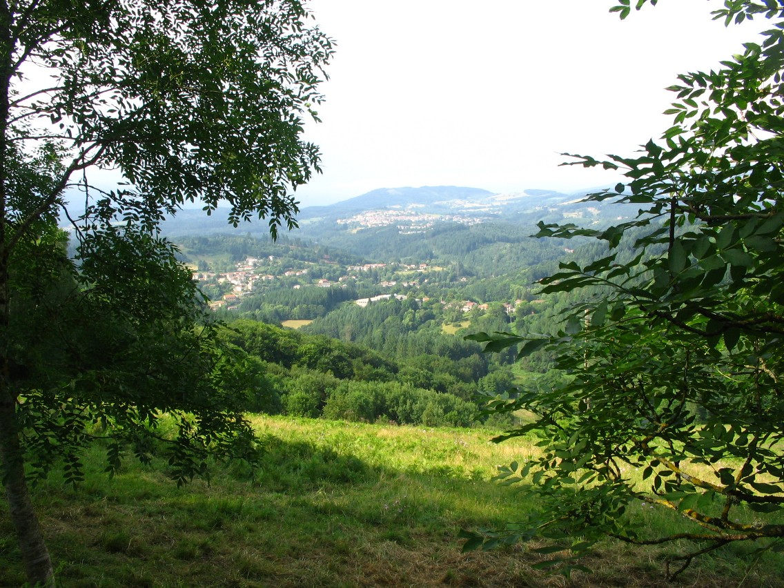 Villages de val de Durolle, PNR Livradois-Forez, Puy de Dôme, depuis les Margerides, entre Thiers et Chabreloche. C'est un secteur industrialisé de longue date, autrefois par la présence de papeteries et nombreux ateliers de coutellerie. Aujourd'hui, des PME profitent de la desserte assurée par l'A89.